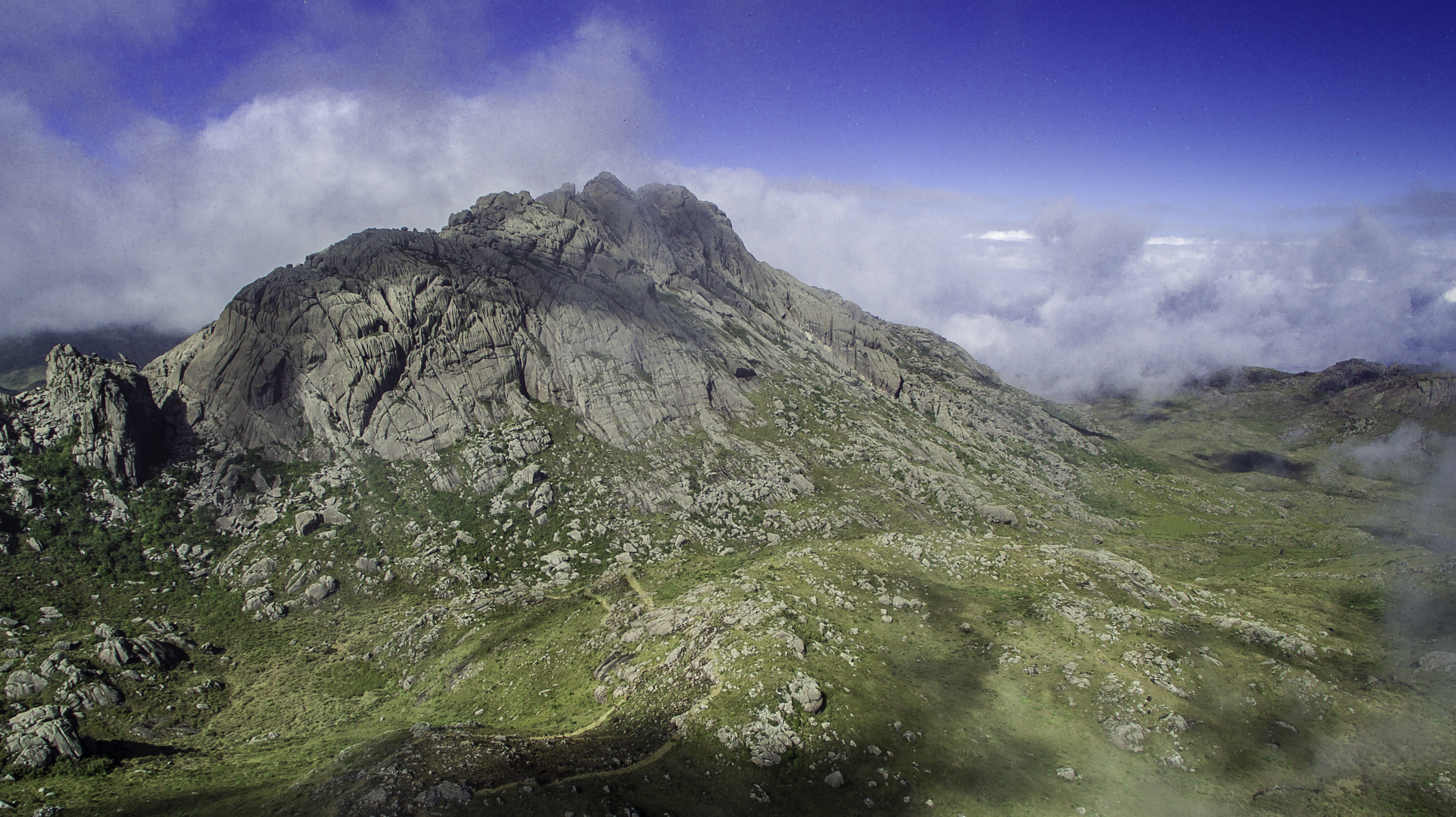 À esquerda está a Asa do Hermes e à direita o Pico das Agulhas Negras.